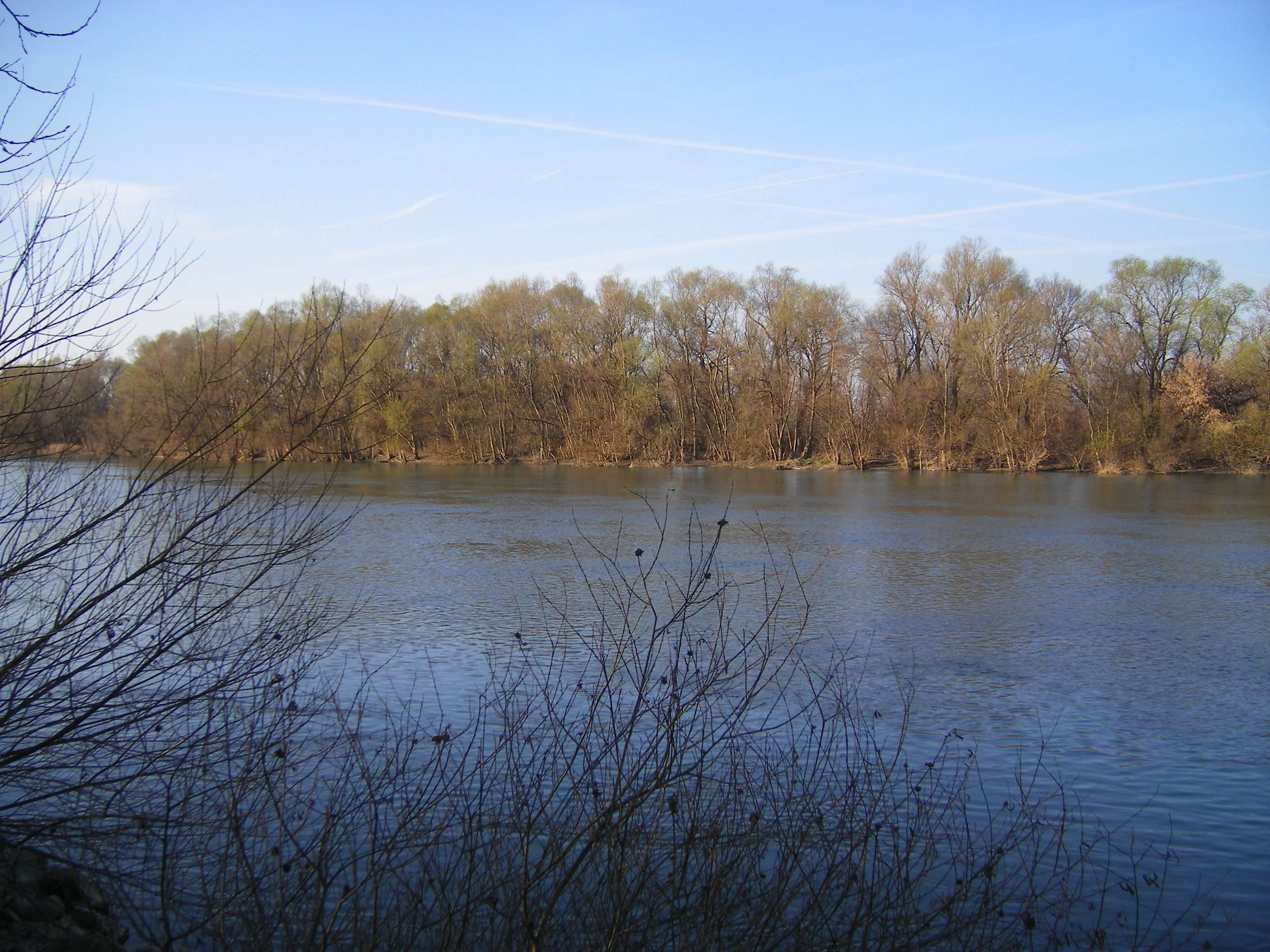 Keszegfalva - Vág-Duna